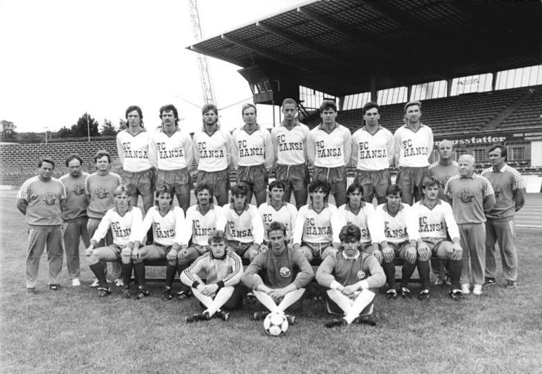 ADN-ZB-Sindermann-10.8.89-ma-Rostock: Fußball-Oberliga-Saison 1989-90-Die Mannschaft des FC Hansa Rostock. Hintere Reihe von links: Jens Wahl, Gernot Alma, Volker Röhrich, Heiko März, Mayk Zimmermann, Andreas Babendererde, Juri Schlünz und Rainer Jahros. Mittlere Reihe von links: Trainer Werner Voigt, Mannschaftsleiter Herbert Maronn, Mannschaftsarzt Dr. Wolfgang Anft, Axel Ullrich, Florian Weichert, Axel Schulz, Jens Leonhard, Torsten Peplow, Trainerassistent Hans Albrecht, Physiotherapeut Günter Blum und Trainerassistent Jürgen Decker. Vorn von links die Torwarte David Hoffmann, Jens Kunath und Dirk Grabow.